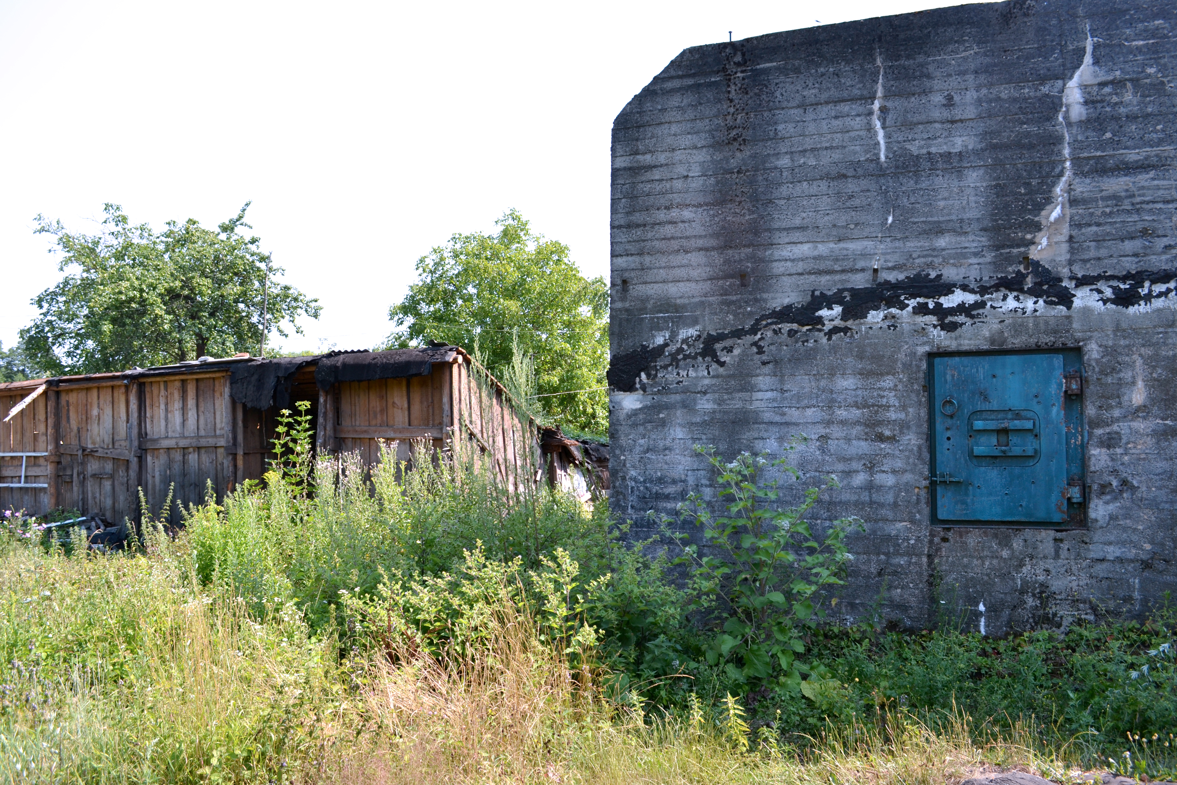 Бункер Гіммлера в с. Гуйва